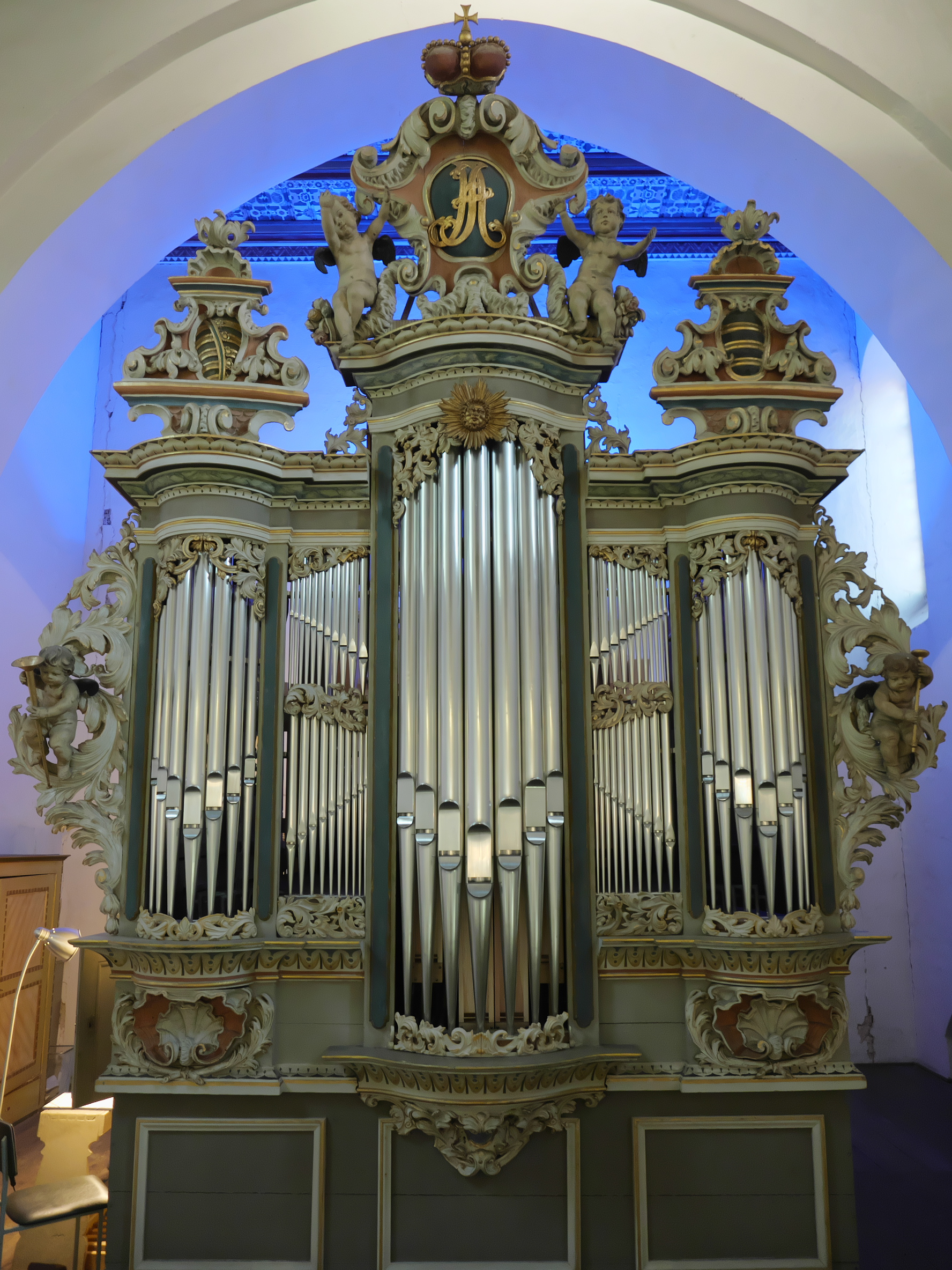 Orgel der Liebfrauenkirche, Jüterbog, Brandenburg, Deutschland